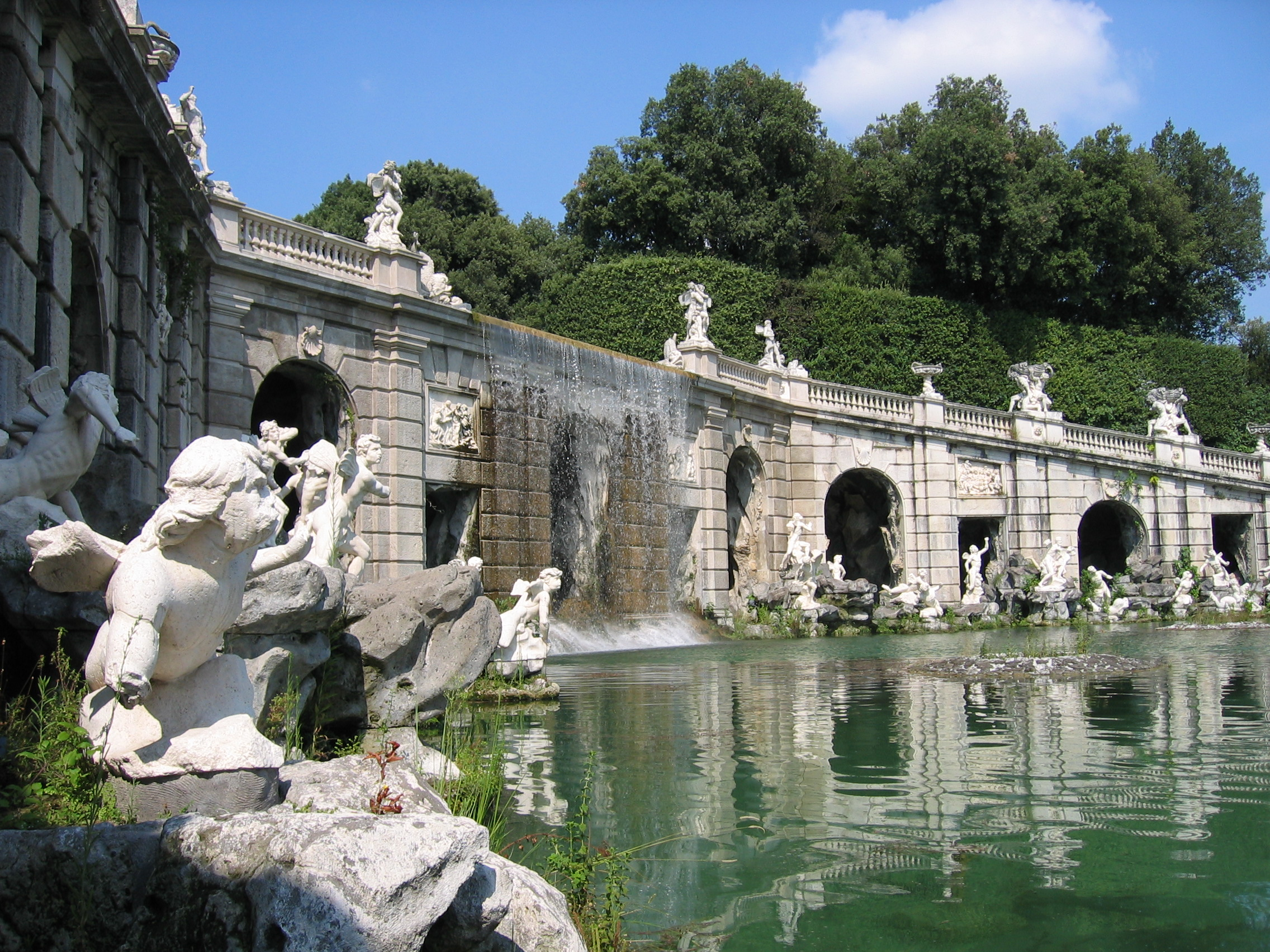 Brunnen im Park des Königspalasts von Caserta